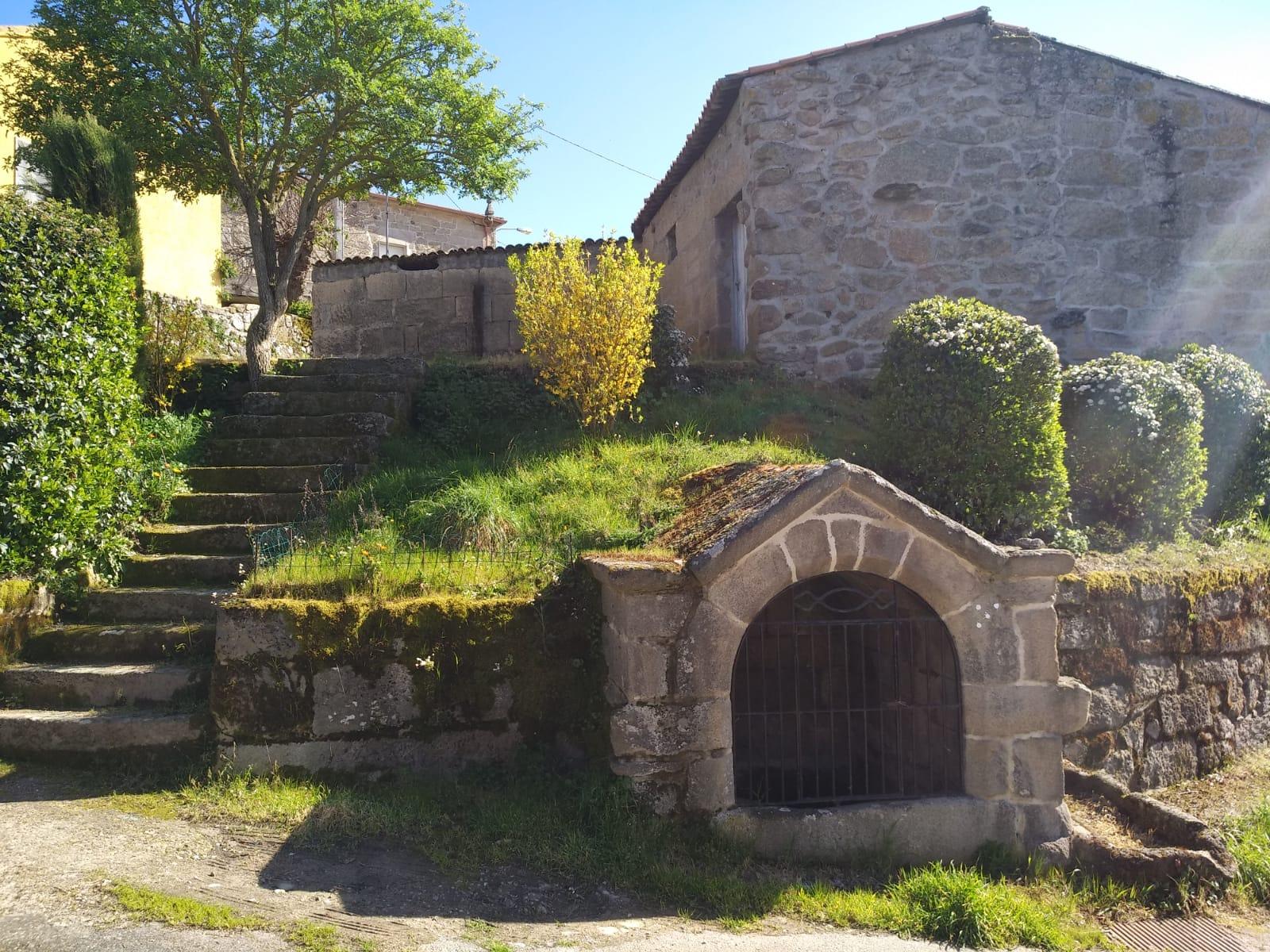 Antigo forno de Guntimil